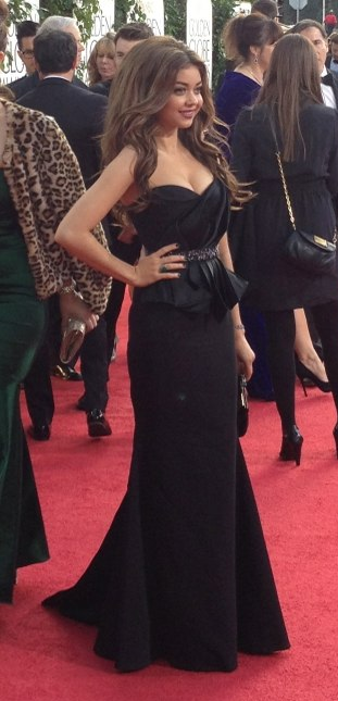 Sarah Hyland